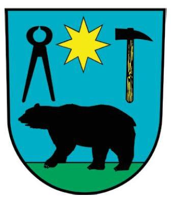 Česky: městský znak Moravský Beroun